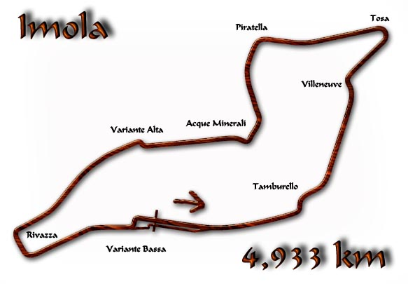 San Marino Grand Prix Formula 1 /2000-2005/ Autor: Jiří Žemlička